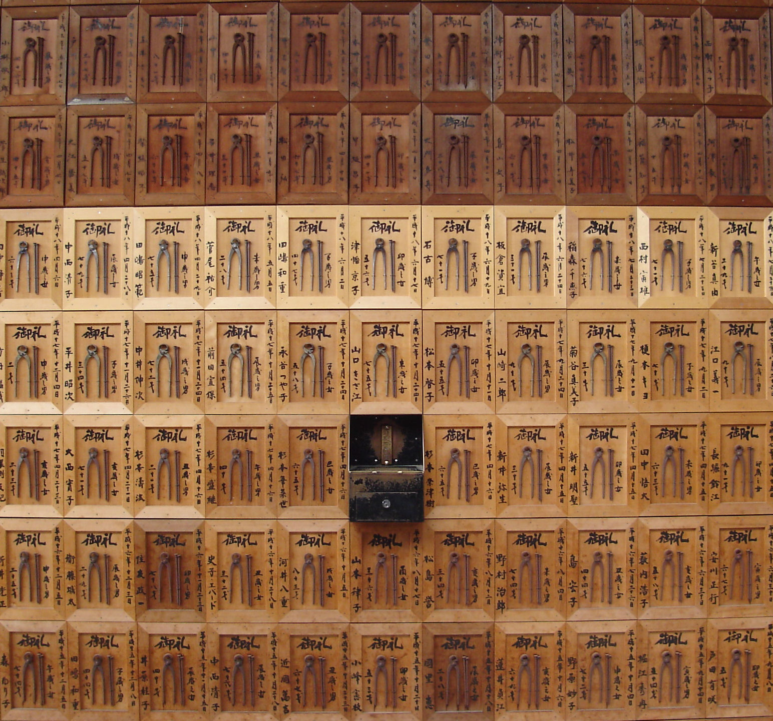 石像寺、地蔵堂の釘抜の絵馬